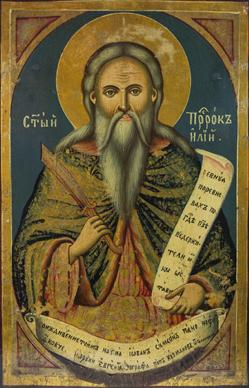 Св. Илија, параклис Св. Кирил и Методиј, Лешочки манастир, с. Лешок. 1887 година. Автор Зограф Евгенија Поп Кузманов од Галичник. Дим: 29 Х 25,5 Х 2 см.